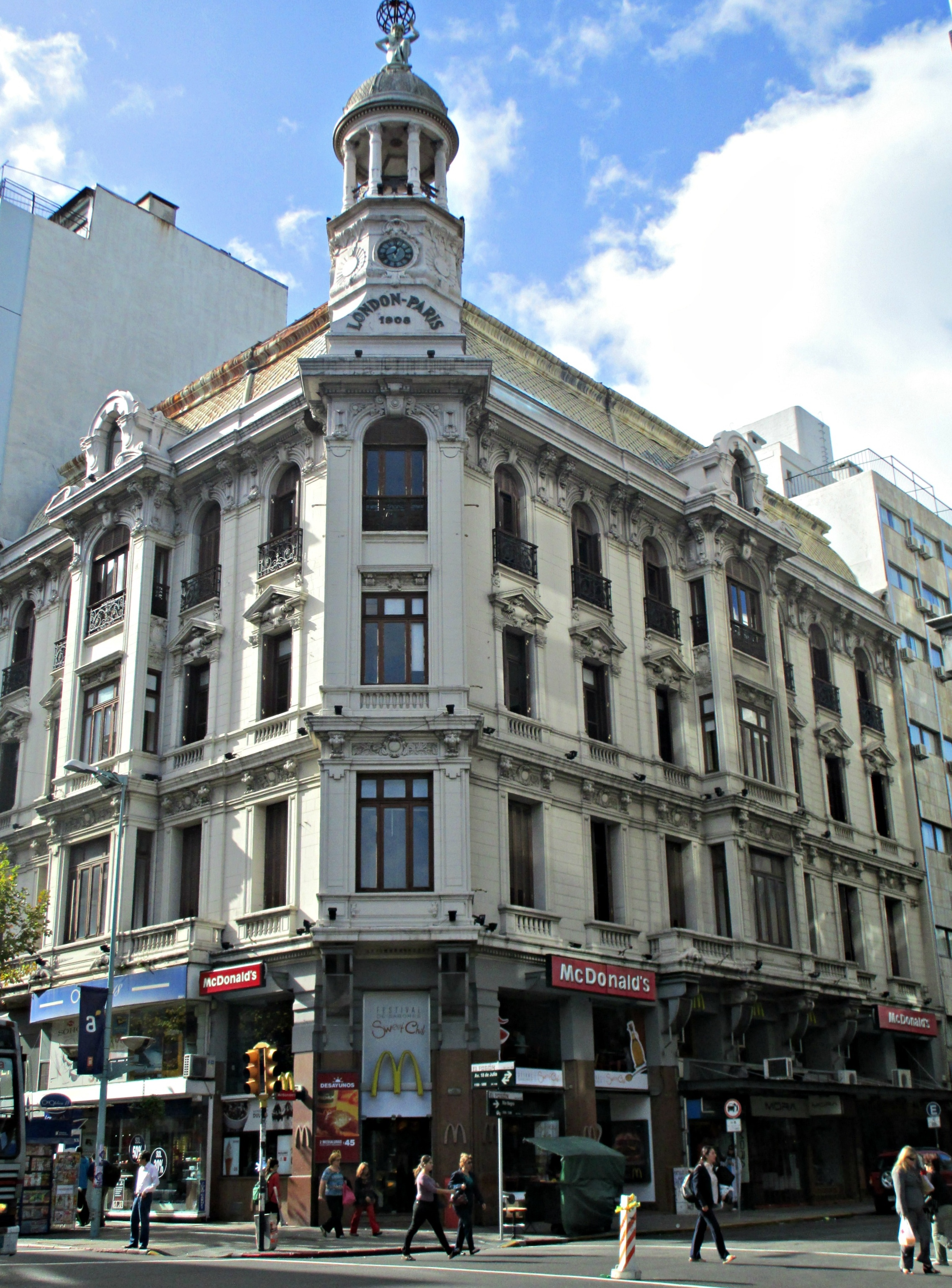 Edificio London Paris por MaxiCiccone en Montevideo, Uruguay